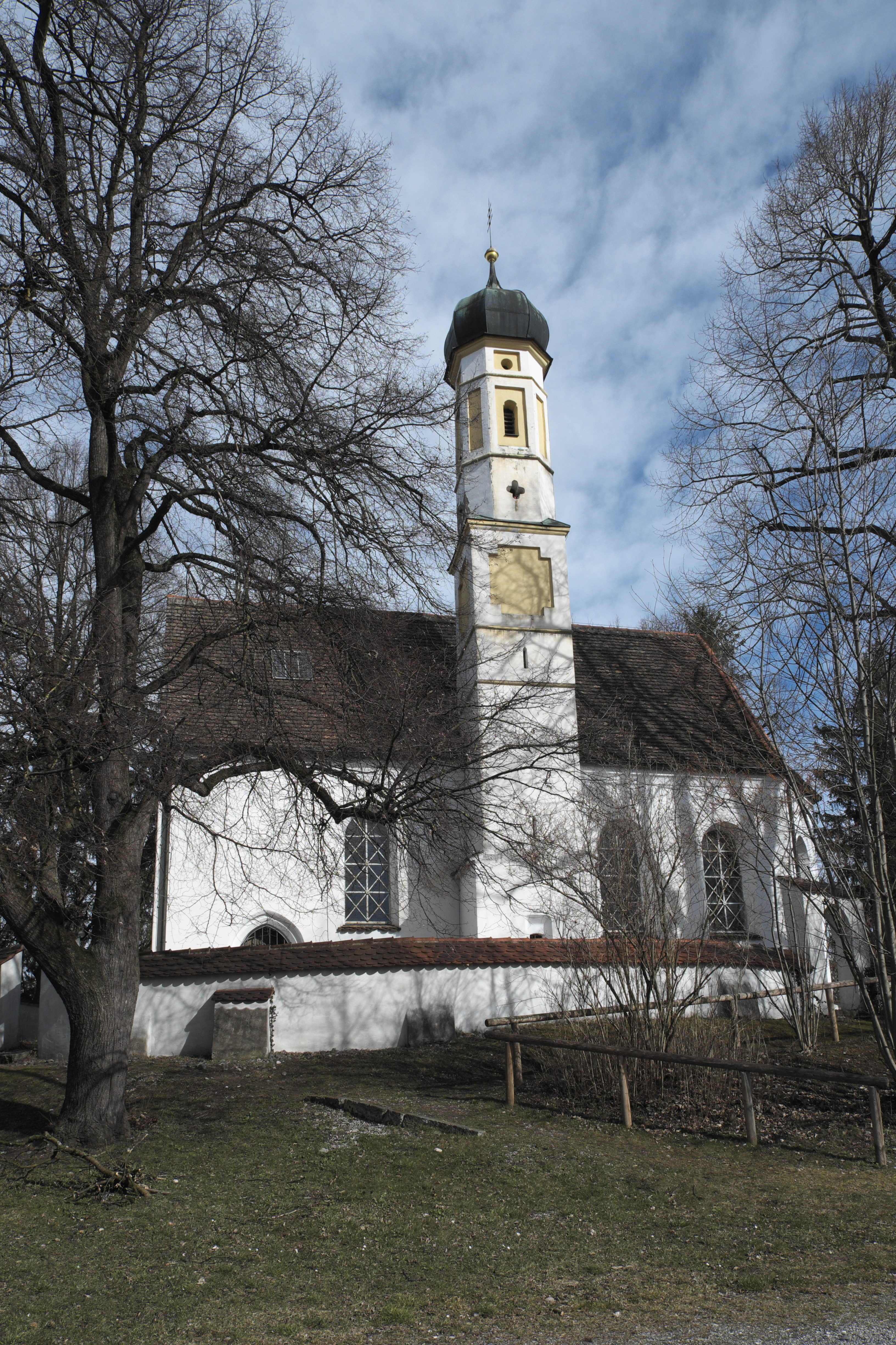 Katholische Filialkirche St. Johannes der Täufer im Ortsteil Töllern in Weilheim in Oberbayern im Landkreis Weilheim-Schongau (Bayern/Deutschland)